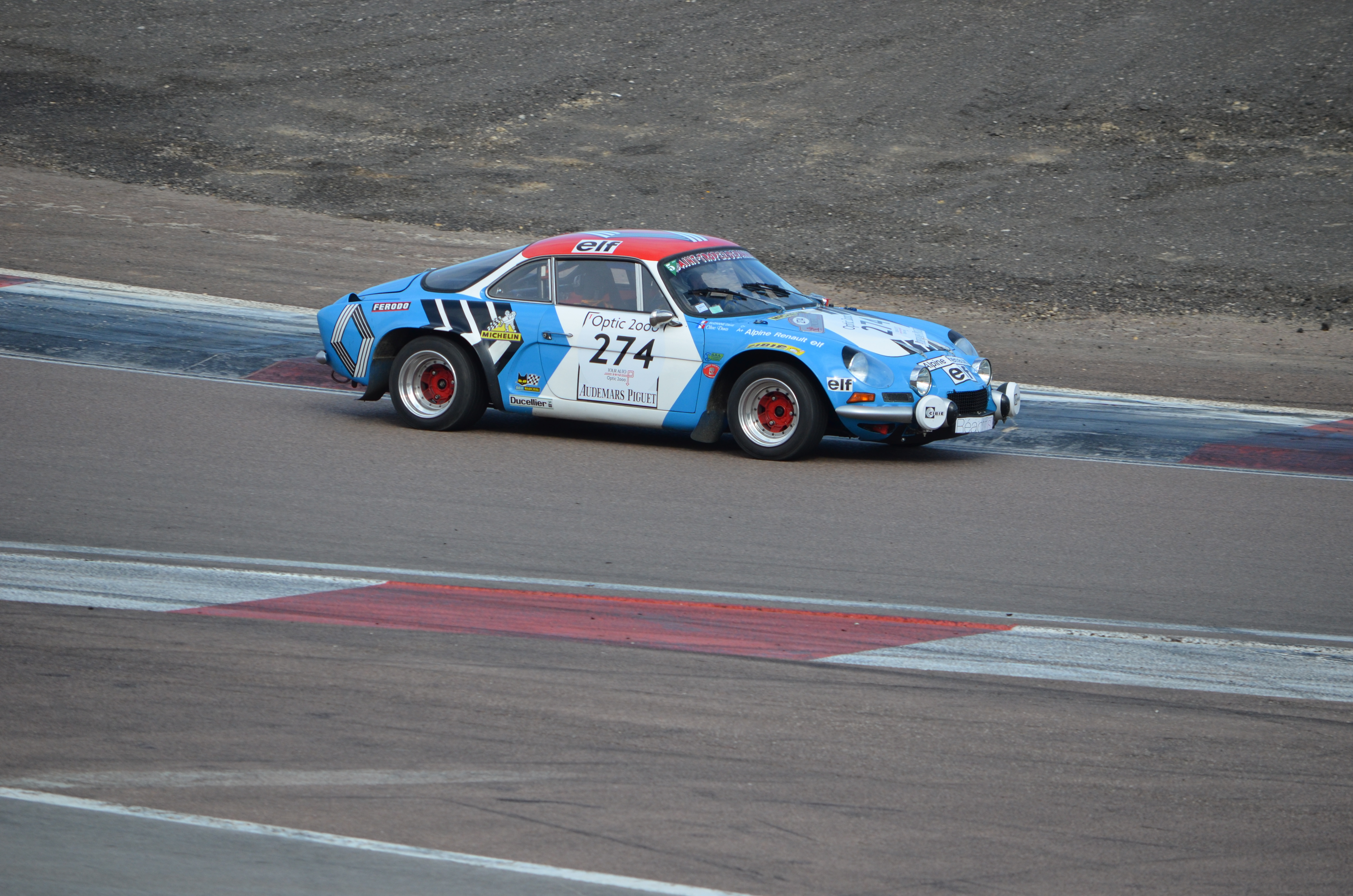 Alpine A110 1800 Groupe 4, numéro 274, Tour Auto 2012, étape sur le Circuit de Prenois.